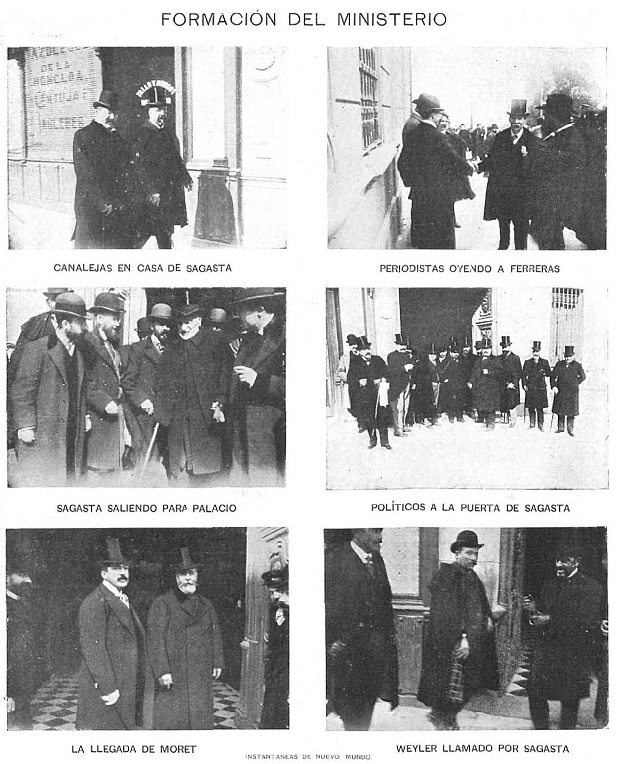 Serie de imágenes relacionadas con la formación de Gobierno por parte de Sagasta en marzo de 1901, recogido en la revista española Nuevo Mundo.